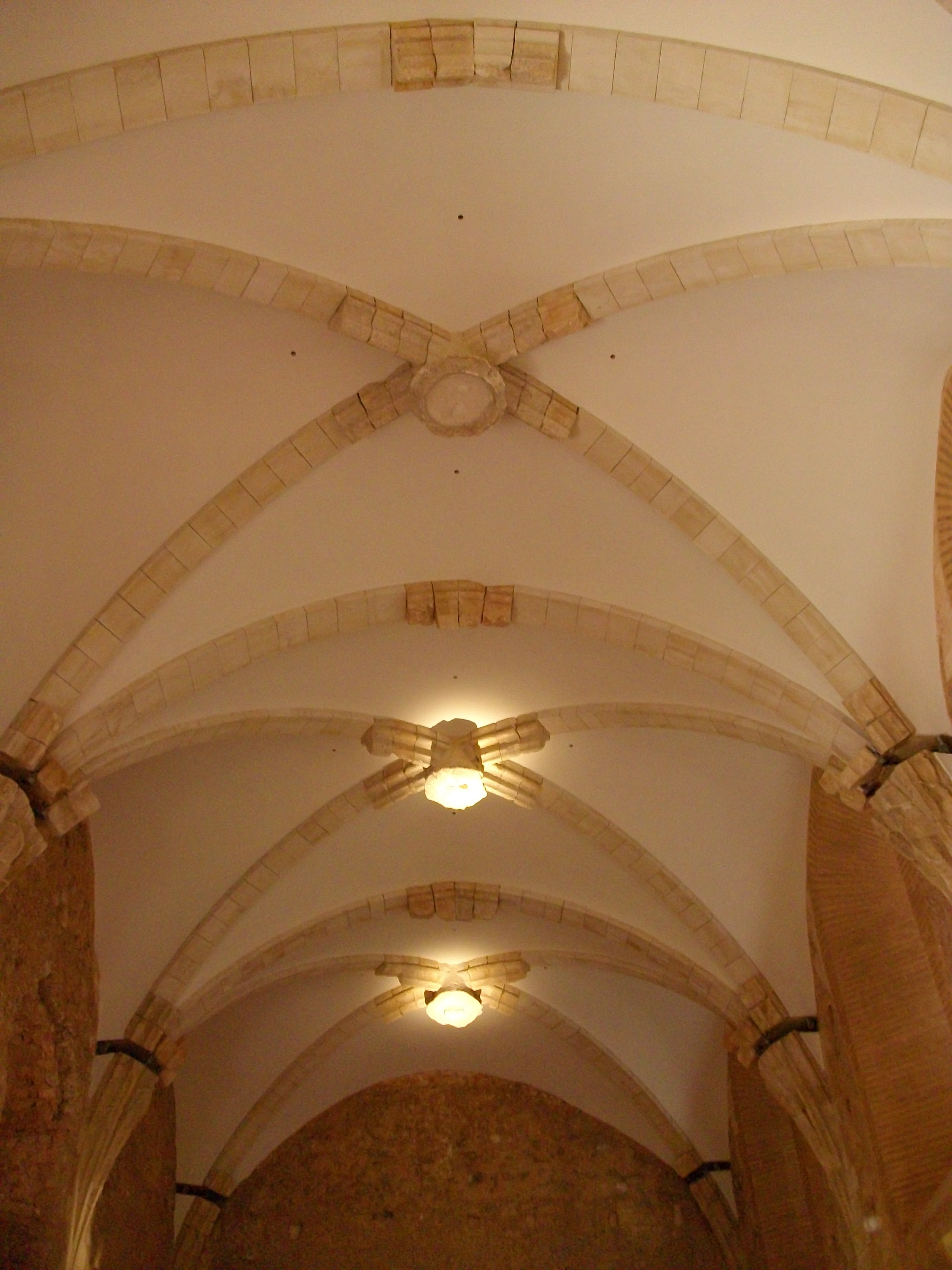 Voltes gòtiques del refectori del Monestir de la Valldigna.